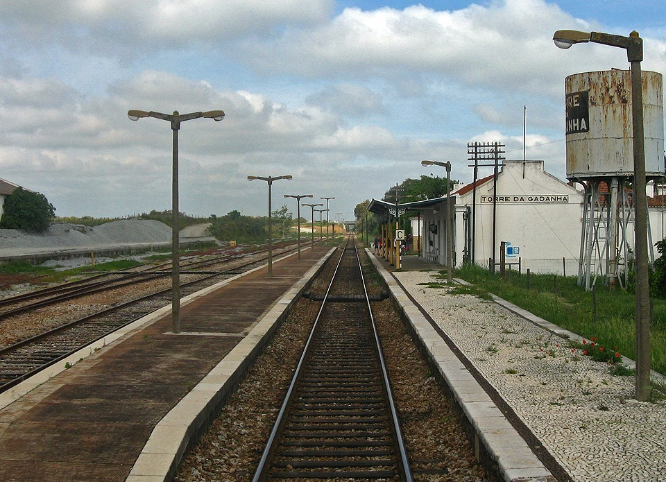 Sem serviço de passageiros, mas pelos vistos estavam alguns na gare!